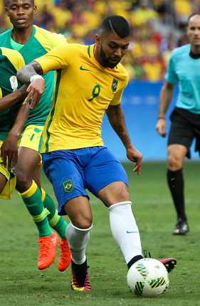 Futebol olímpico do Brasil estreia contra África do Sul